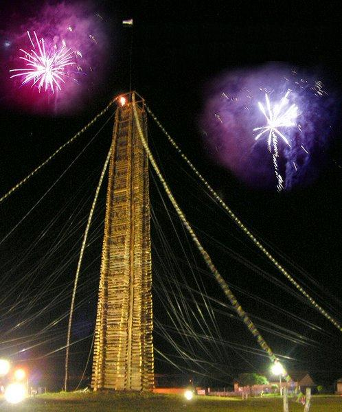 Fogueira de Jateí